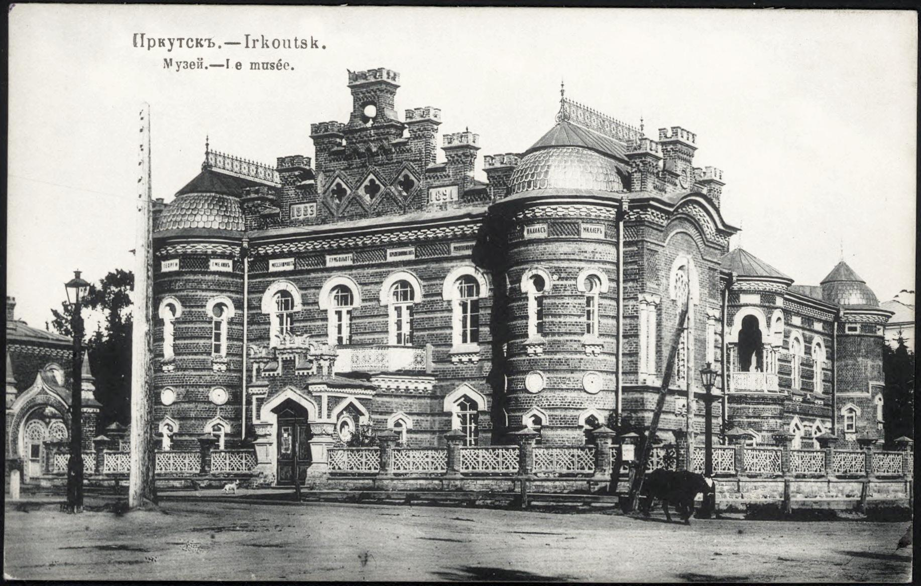 г. Иркутск. Музей императорского географического общества 1882 г., арх. Г. В. Розен.